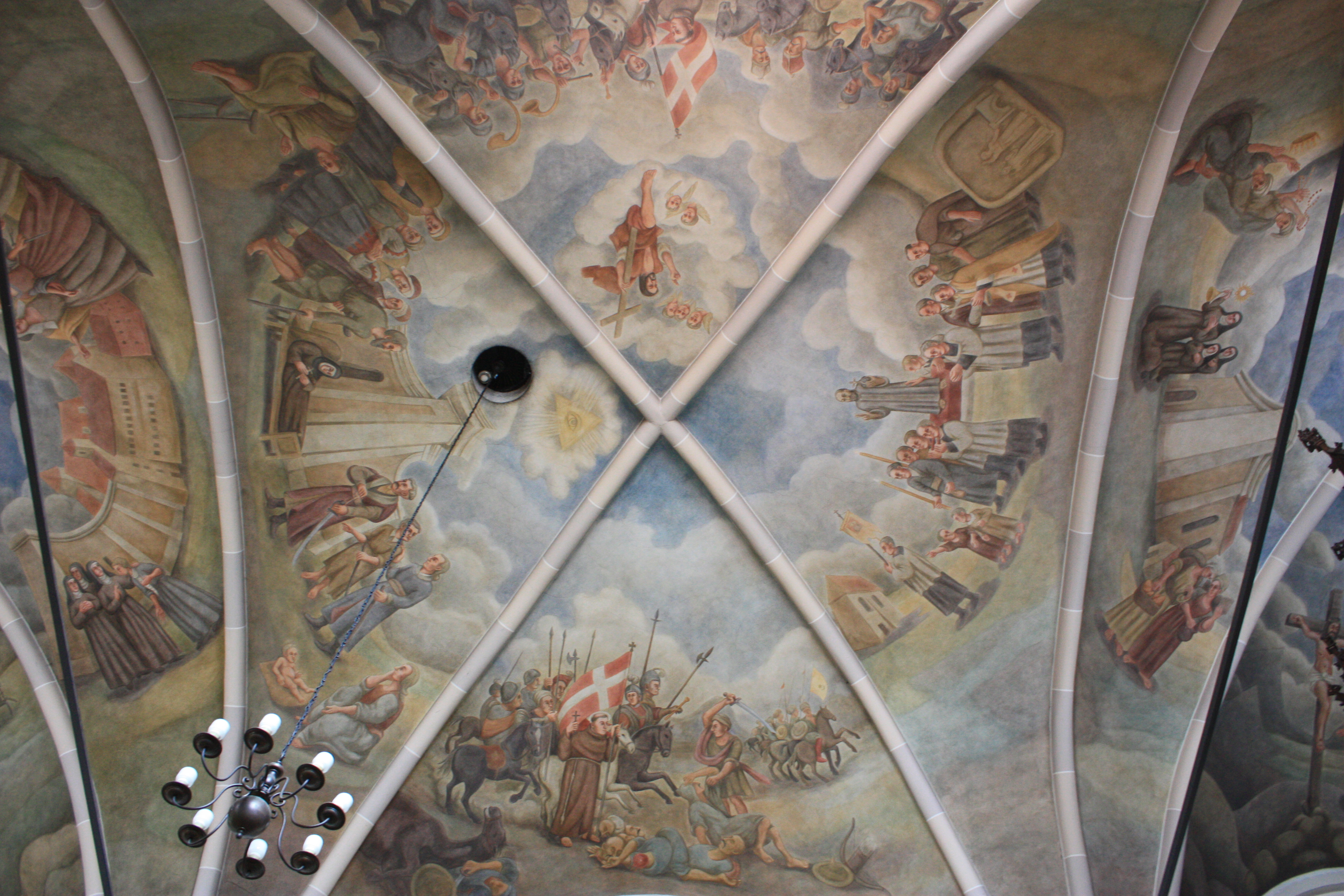 Kościół Przemienienia Pańskiego w Poznaniu. Sklepienie.